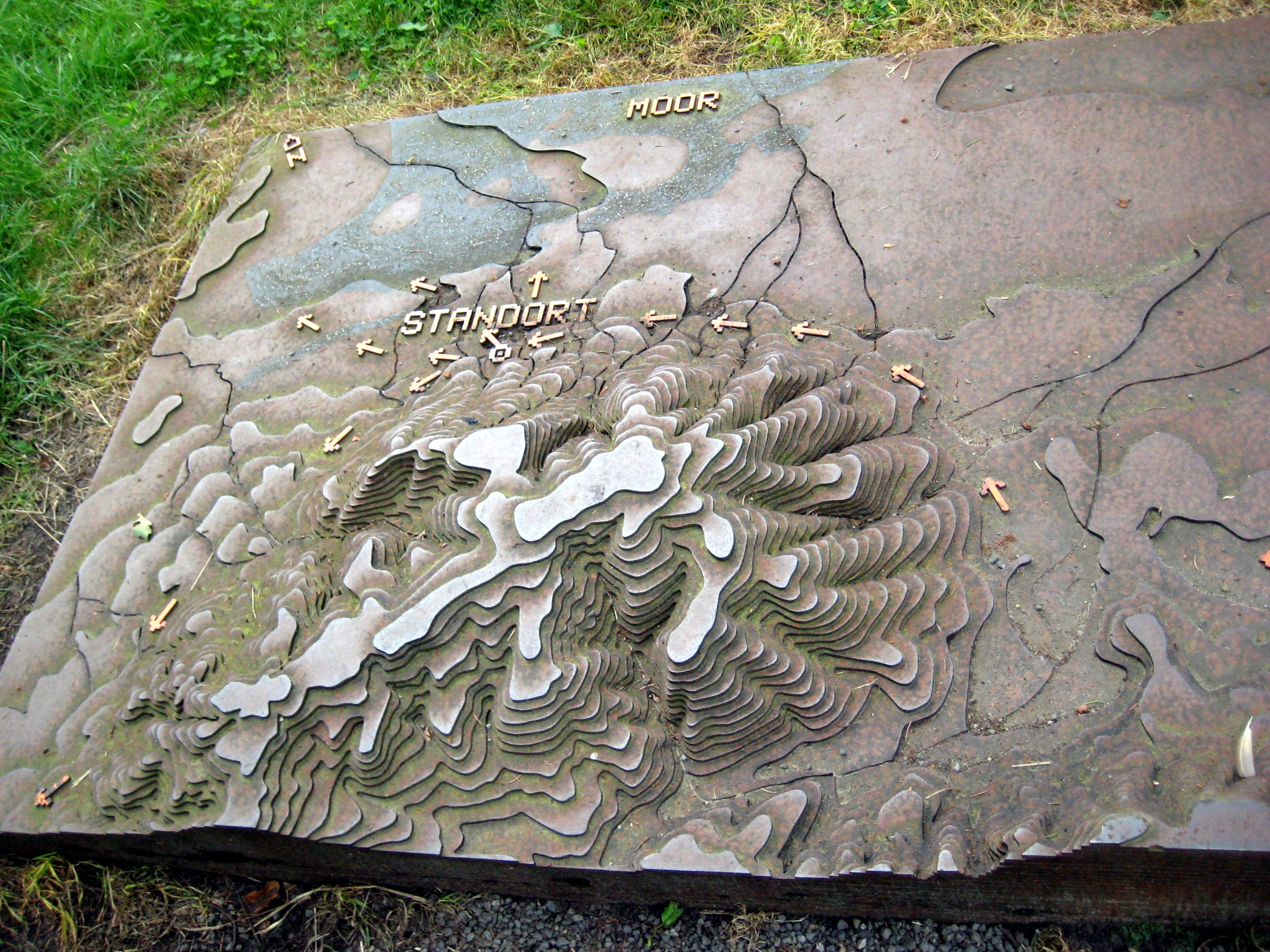 Kalkriese